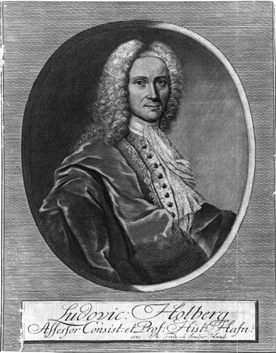 Portræt af Ludvig Holberg 1731